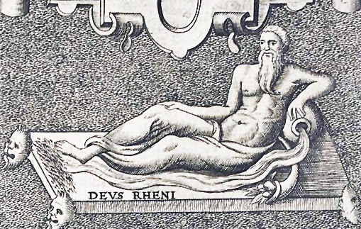 Ausschnitt des Mercator – Stadtplanes Köln. Darstelung des Rheingottes „DEVS RHENI“